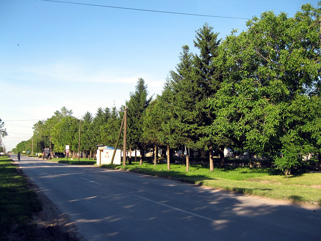 Centar Česterega gledano od Zrenjanina, autor Ljubiša Šujica